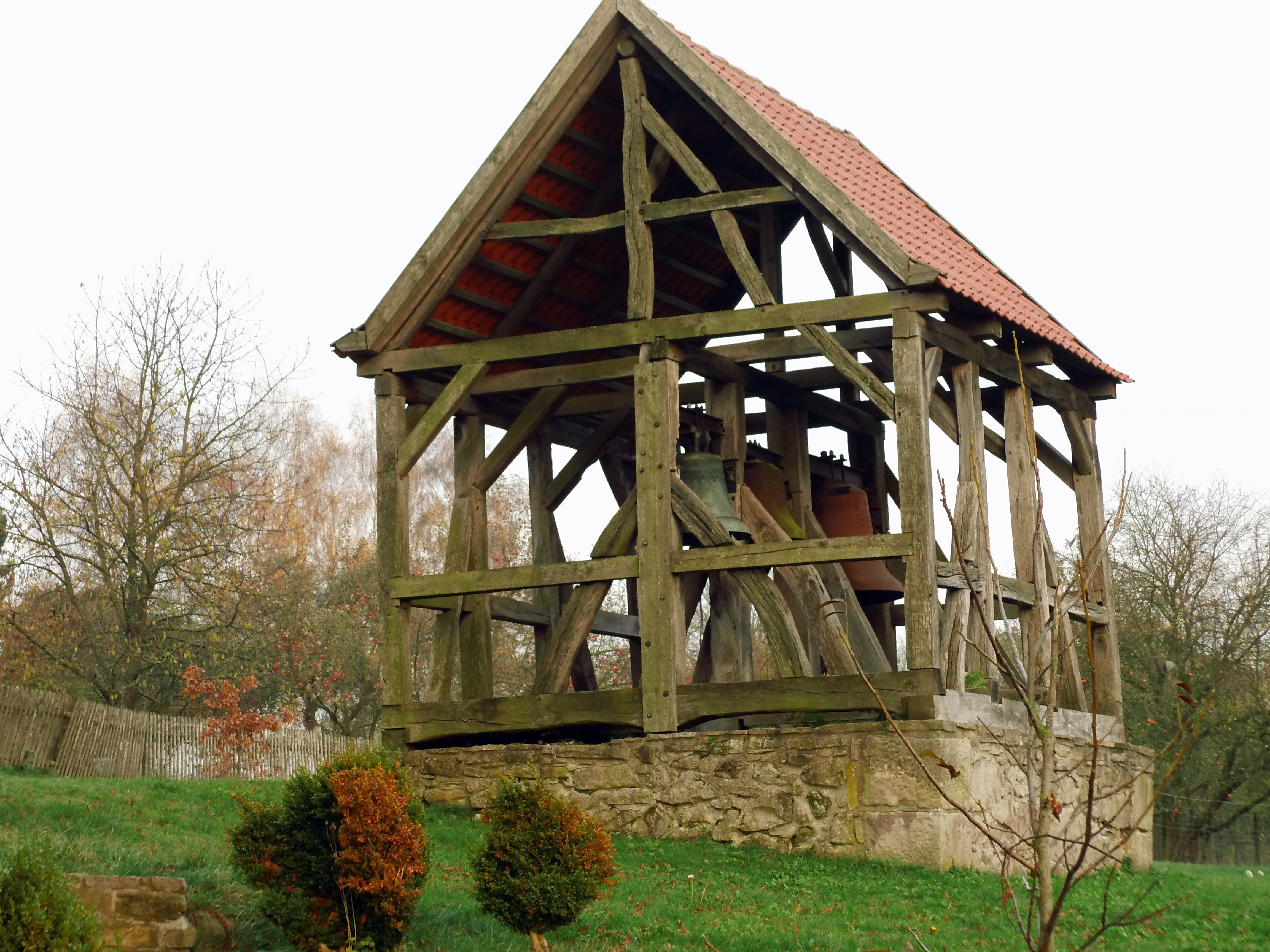 Freistehender Glockenstuhl neben der Kirche in Limlingerode. Foto: Holger Zürch